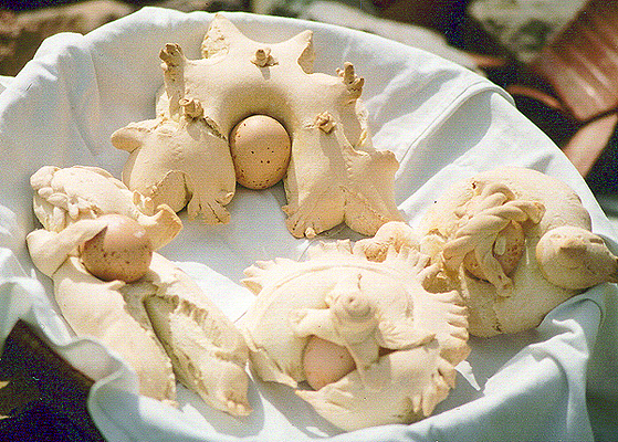 Coccoi Cun S'Ou Pane Pasquale Pane di semola con un uovo al centro. Giba, Sardegna, Italia.